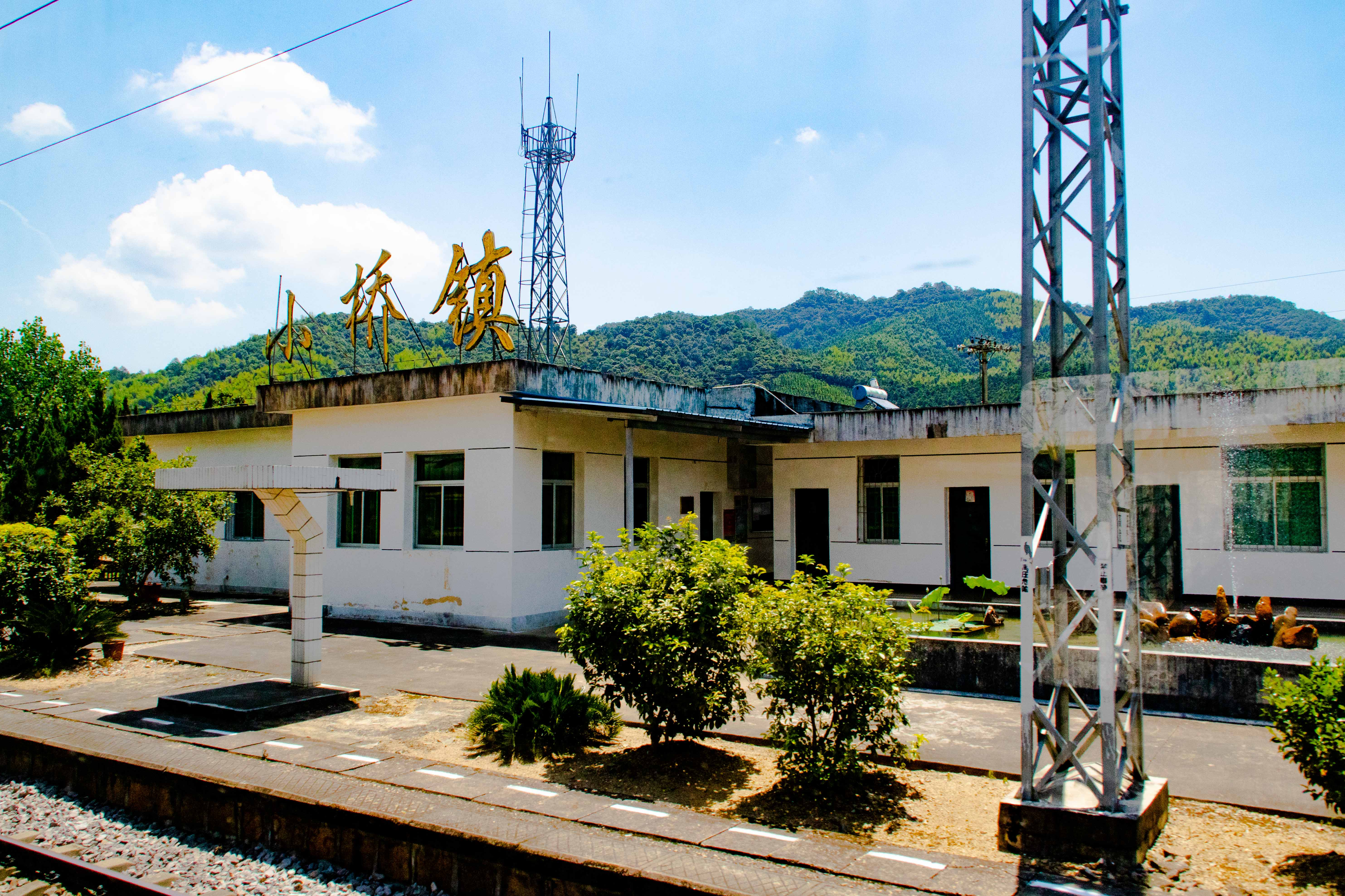 小桥镇站站房